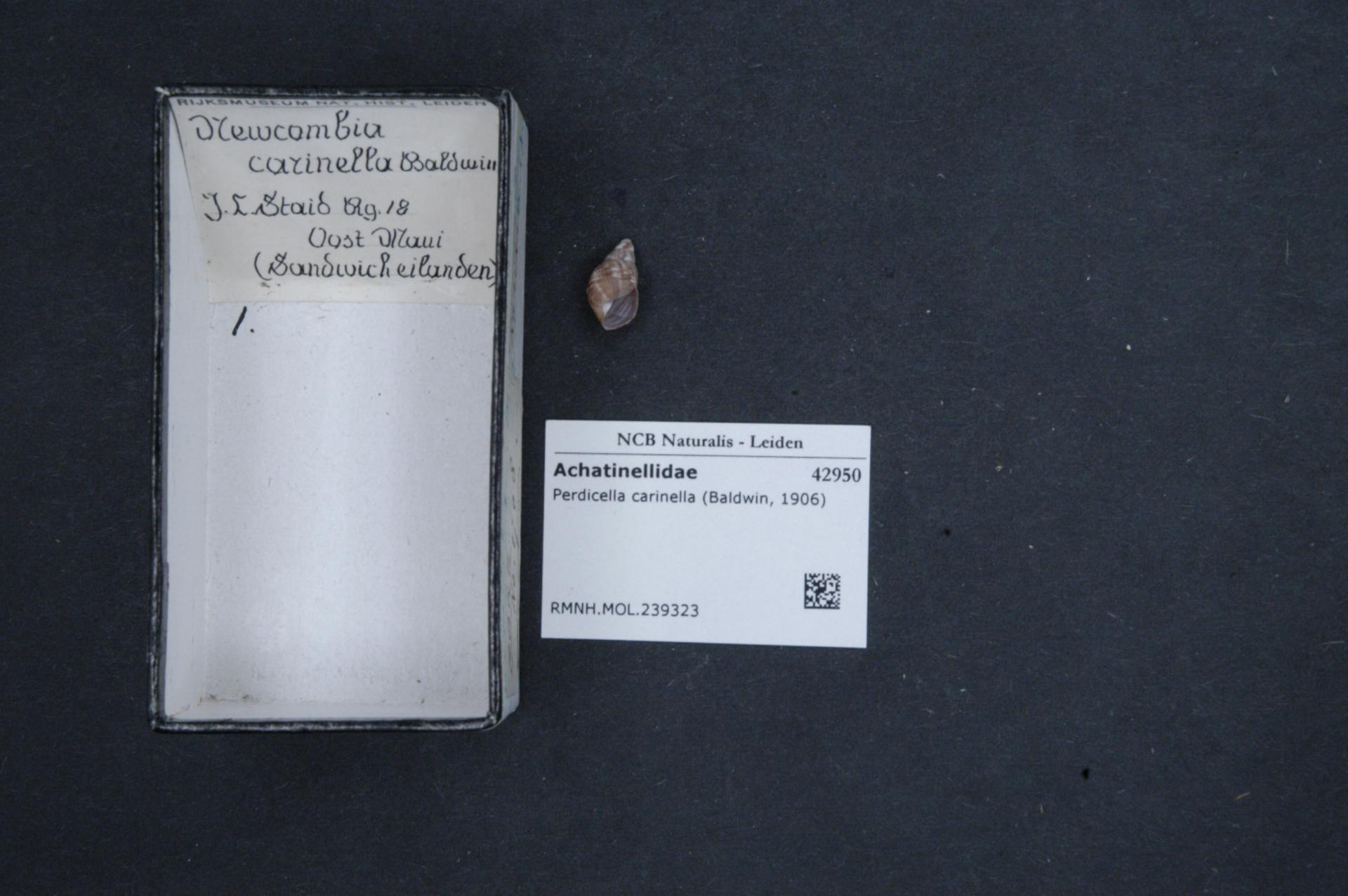 Perdicella carinella (Baldwin, 1906)